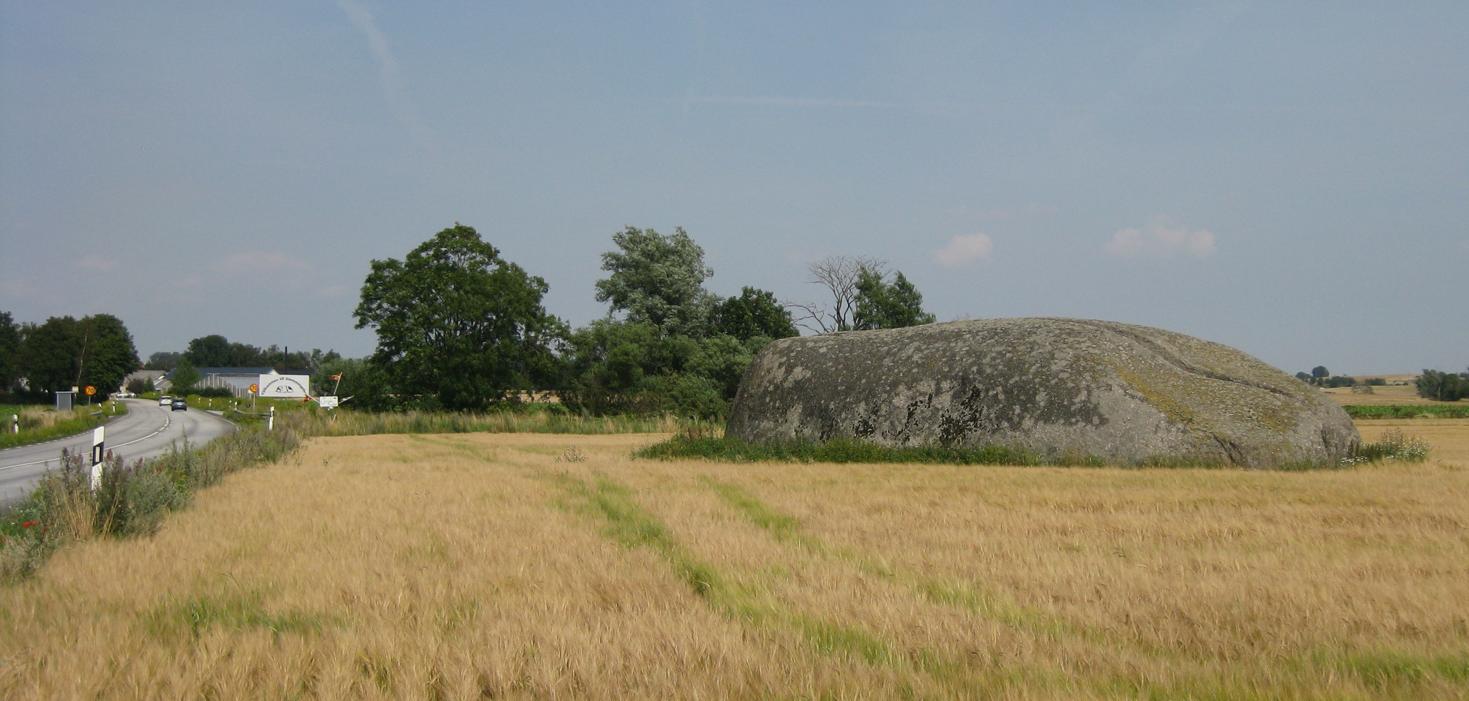 Klövasten